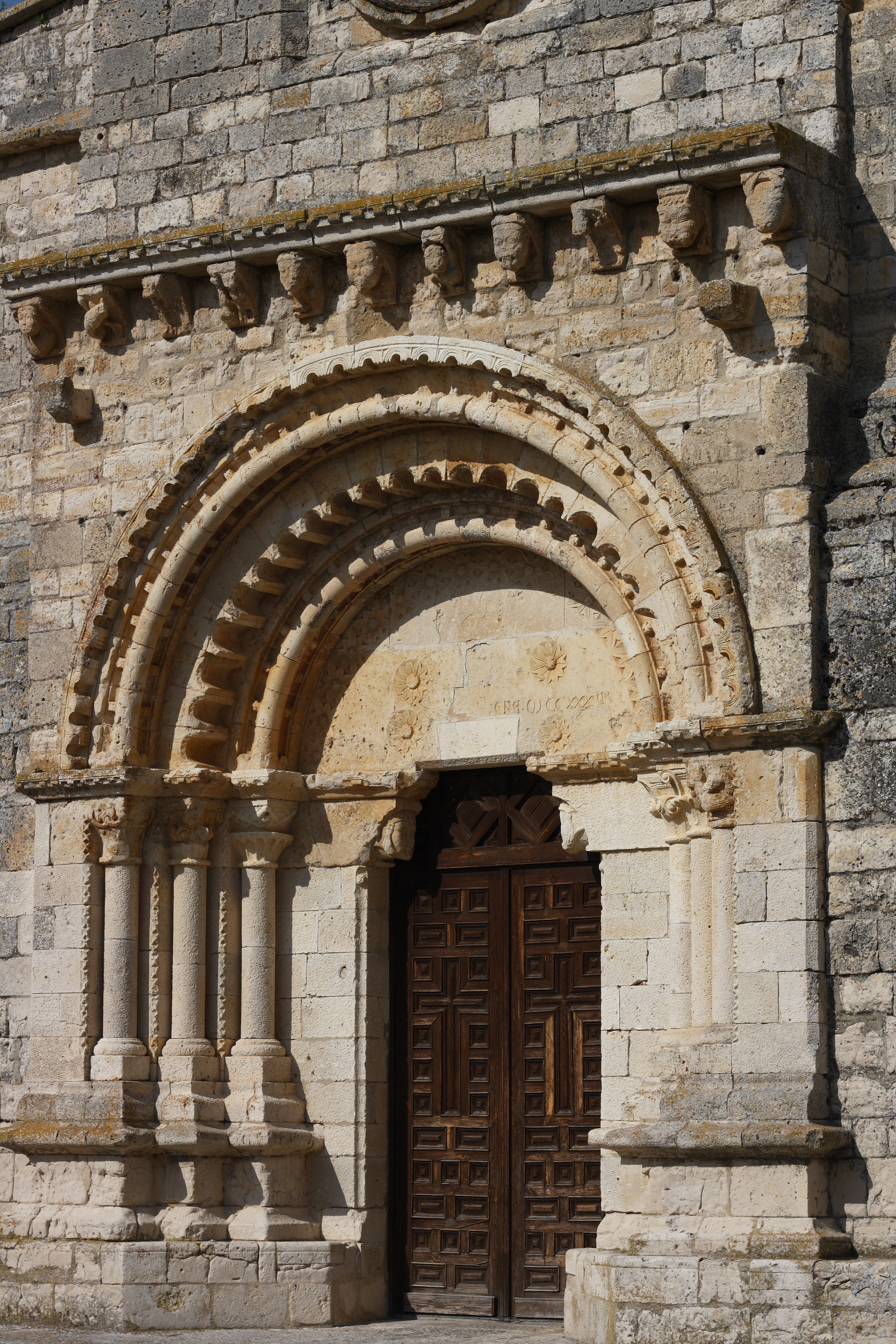 Katholische Kirche Santa María de Wamba in Wamba in der spanischen Provinz Valladolid (Castilla y León), romanisches Archivoltenportal mit Kragsteinen an der Westfassade